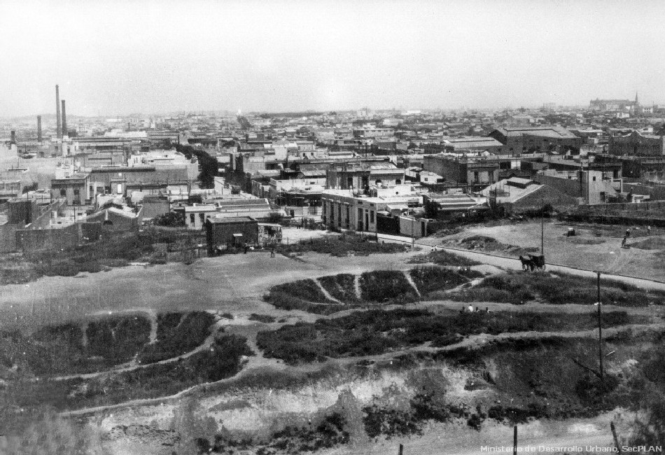 Vista del Barrio Parque de los Patricios, año 1928, tomada desde el Inst. Bernasconi, en construcción. Se observan los pozos de extracción de barro para el horno de ladrillos "La Americana" que existía en el predio antes del propio Instituto, y que se traían de la manzana de enfrente, hasta nivelarla. Luego allí se construiría la Maternidad Sardá.Archivo General de la Nación Argentina.